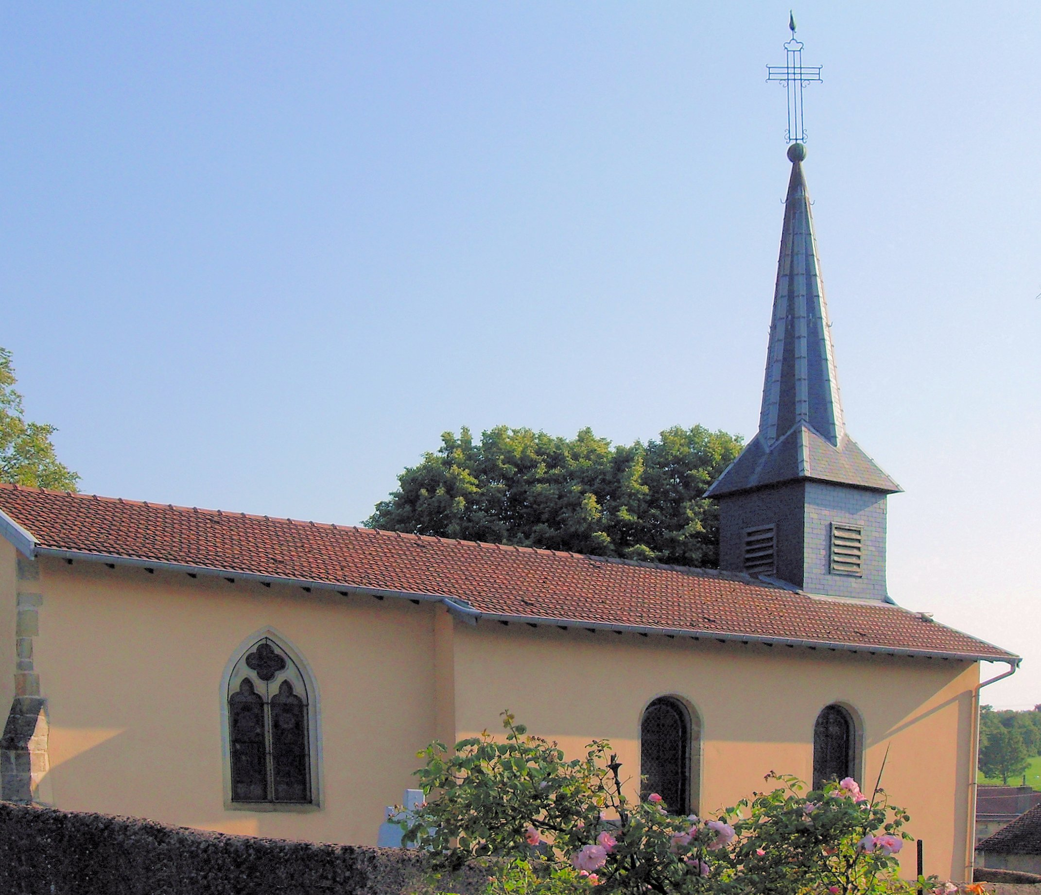 L'église Saint-Félix à Zincourt